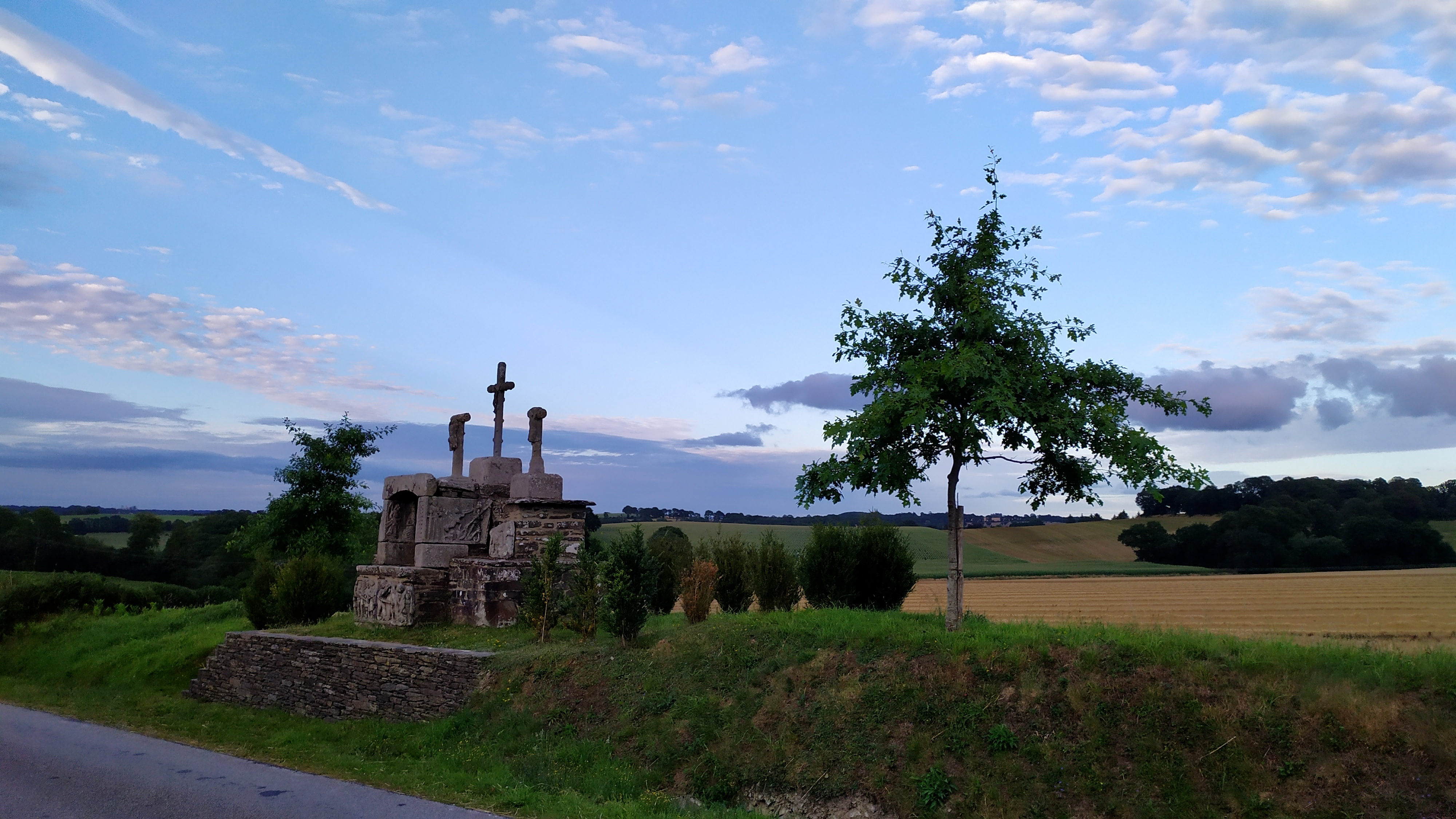 calvaire de Kerbreudeur, vue générale